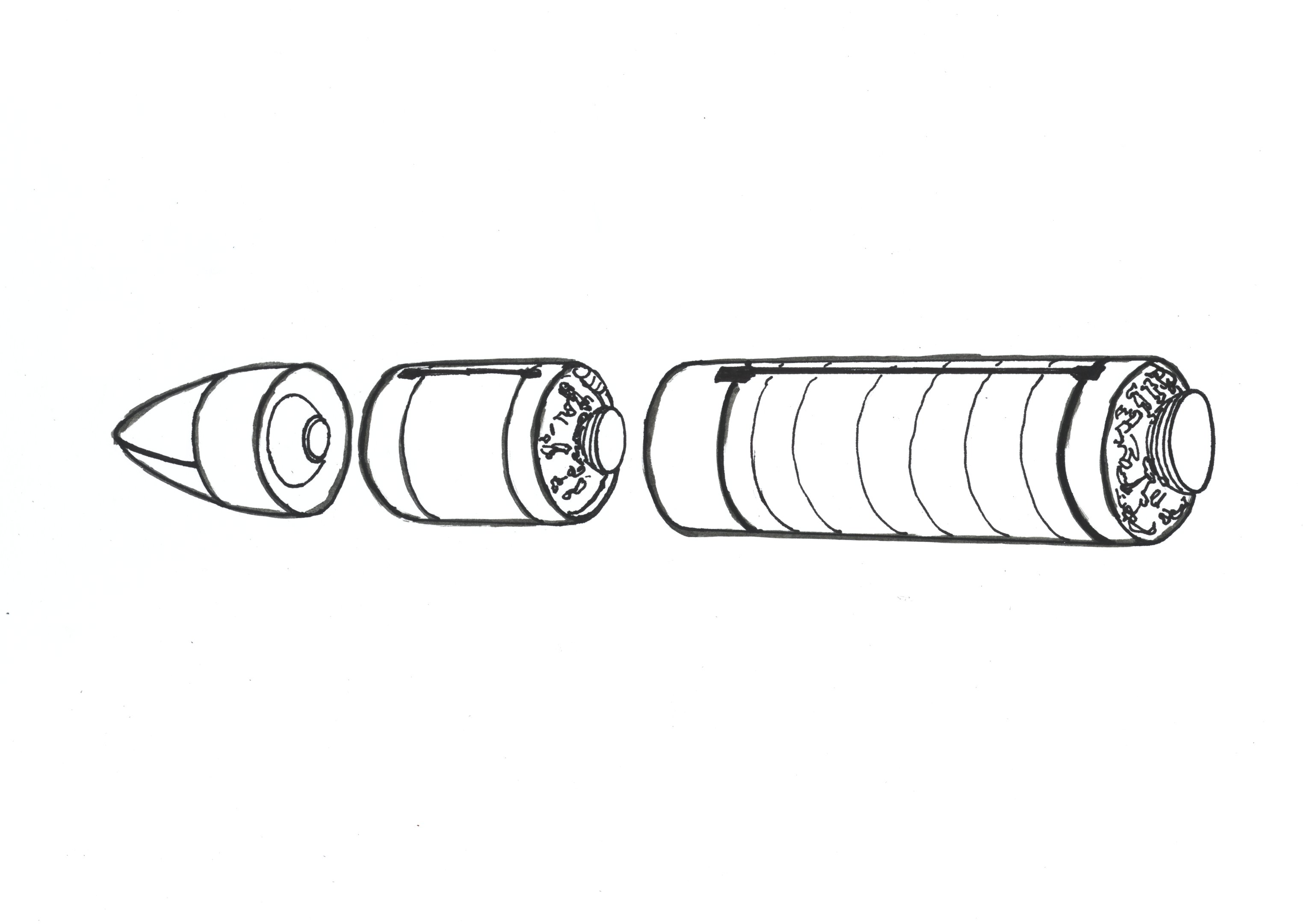 Missile M45